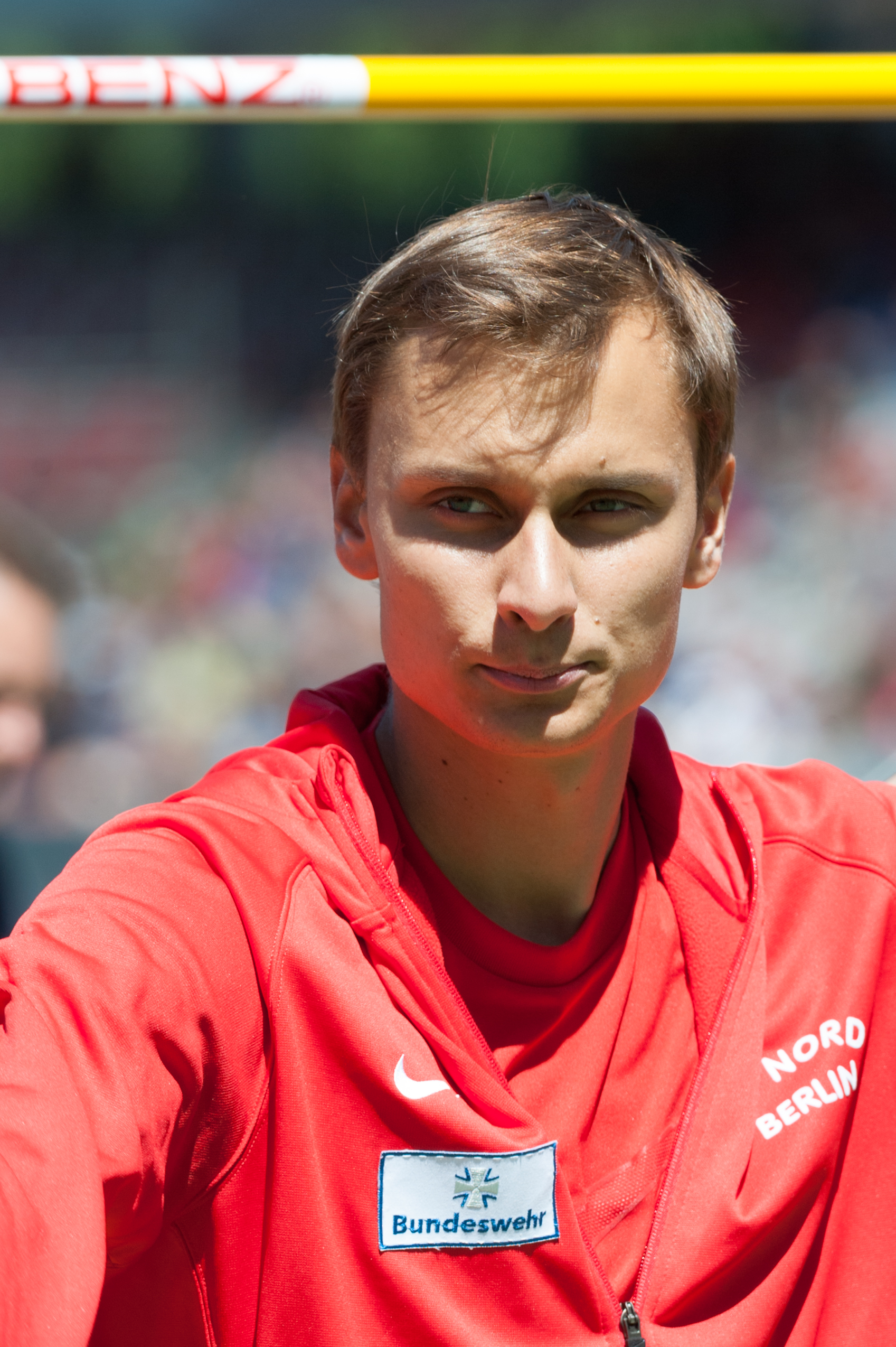 Deutsche Leichtathletik-Meisterschaften 2015: Männer Hochsprung - Raúl Spank, LG Nord Berlin